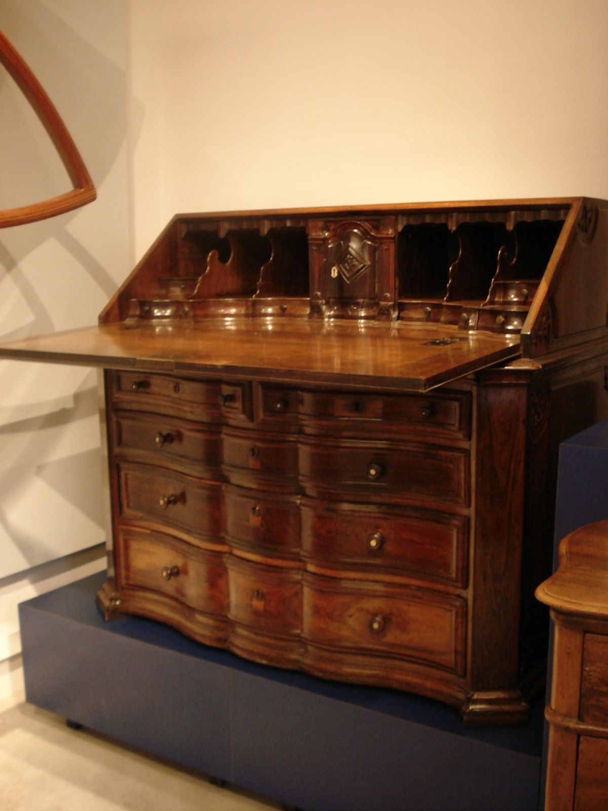 Cômoda-papeleira, fabricada em jacarandá-da-Bahia, estilo D. José I. Data do início do século XIX e é proveniente de Itu, no estado de São Paulo, Brasil. Pertenceu à Madre Teodora Voison, nascida na França em 1835 e radicada em Itu na segunda metade do século XIX. A cômoda pertence ao acervo do Museu da Casa Brasileira.